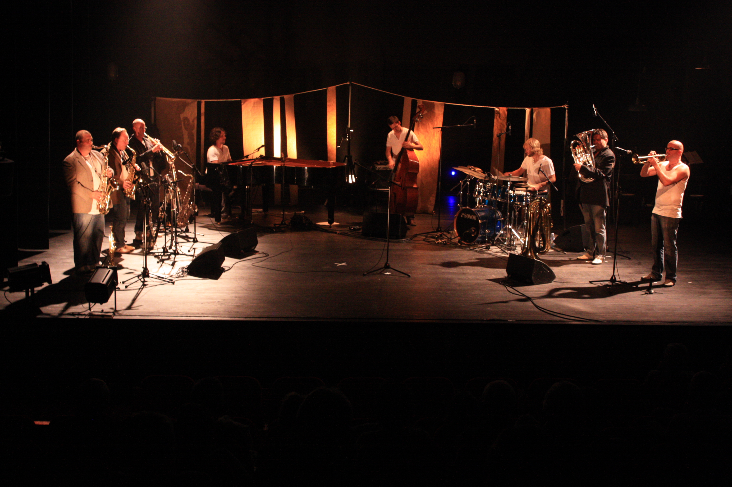 Amañ Octet en captation